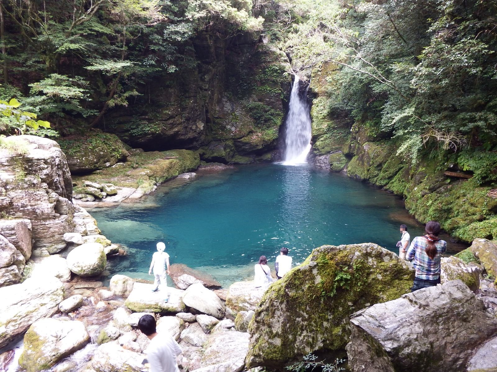 にこ淵の全体像